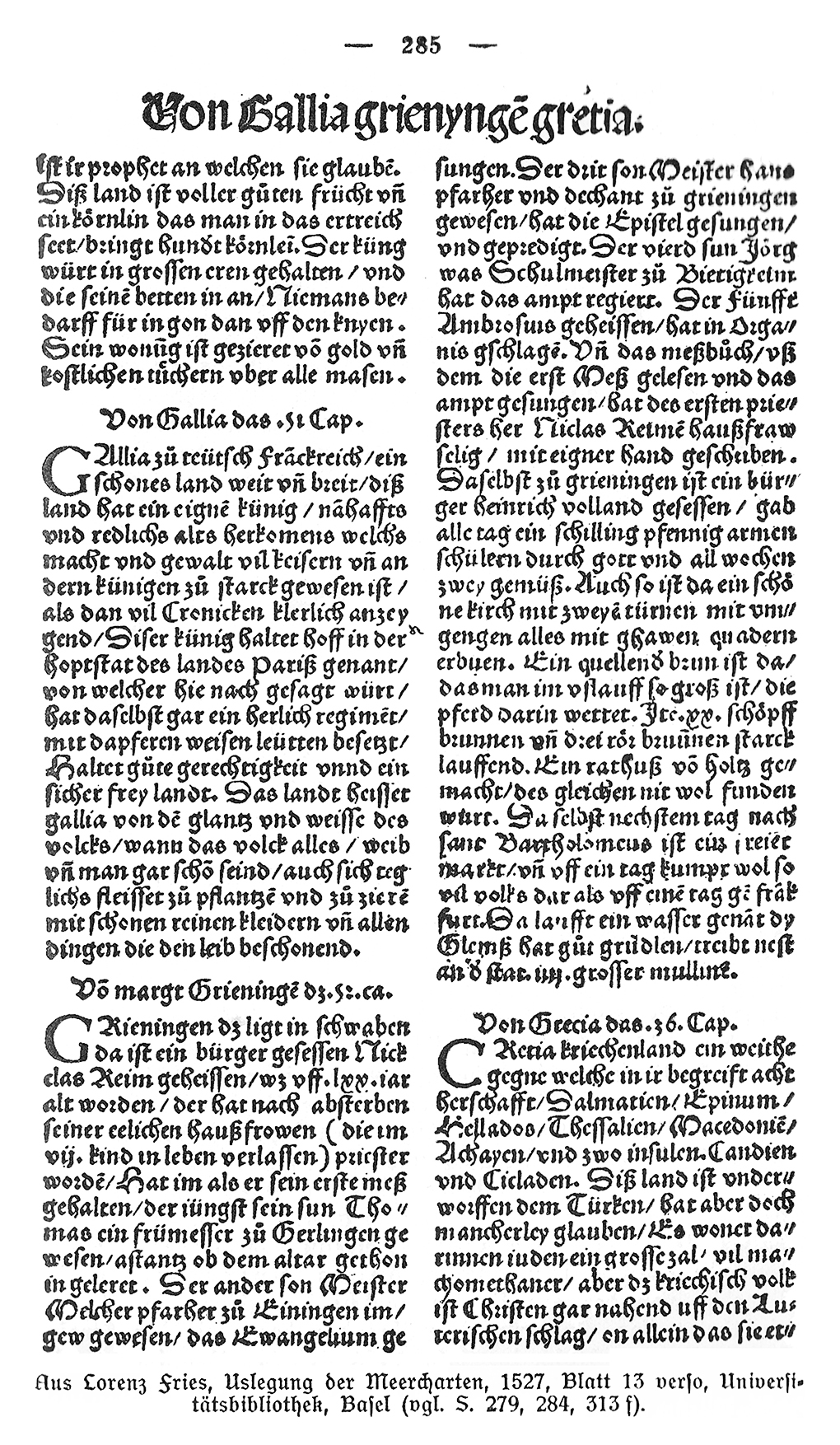 Margt Grieningen 1527 Faksimile bei Römer, 1933, S. 285